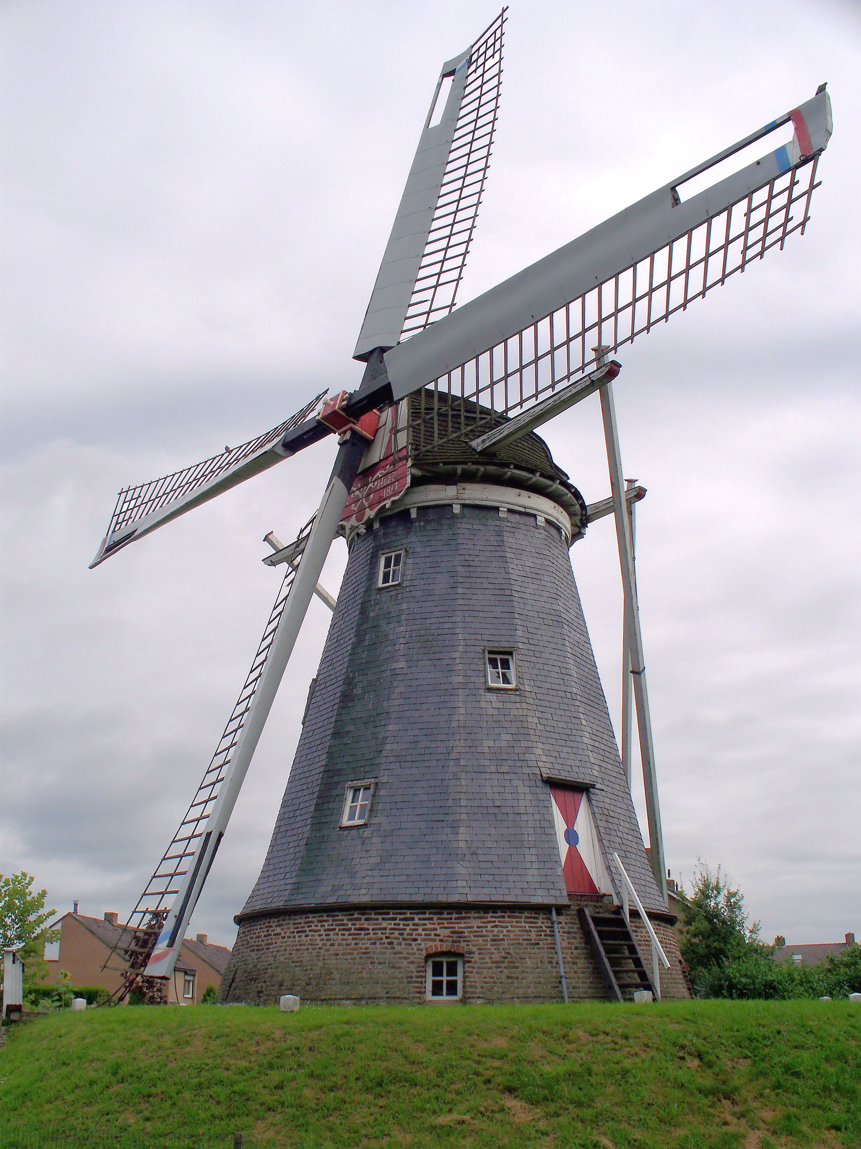 Windmolen de Hoop, Horn, Molenweg